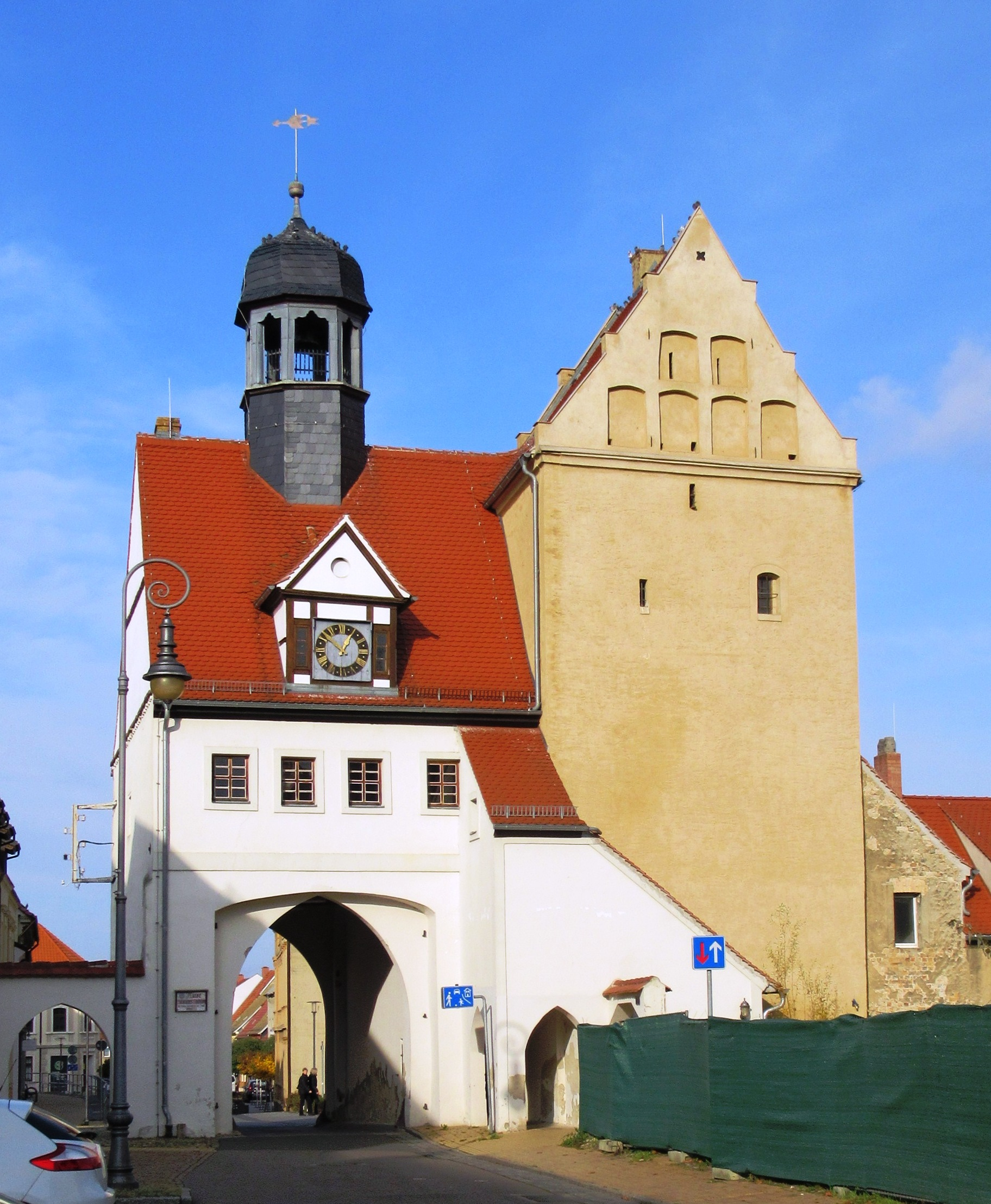 Bad Schmiedeberg, Stadtor (Kulturdenkmal)